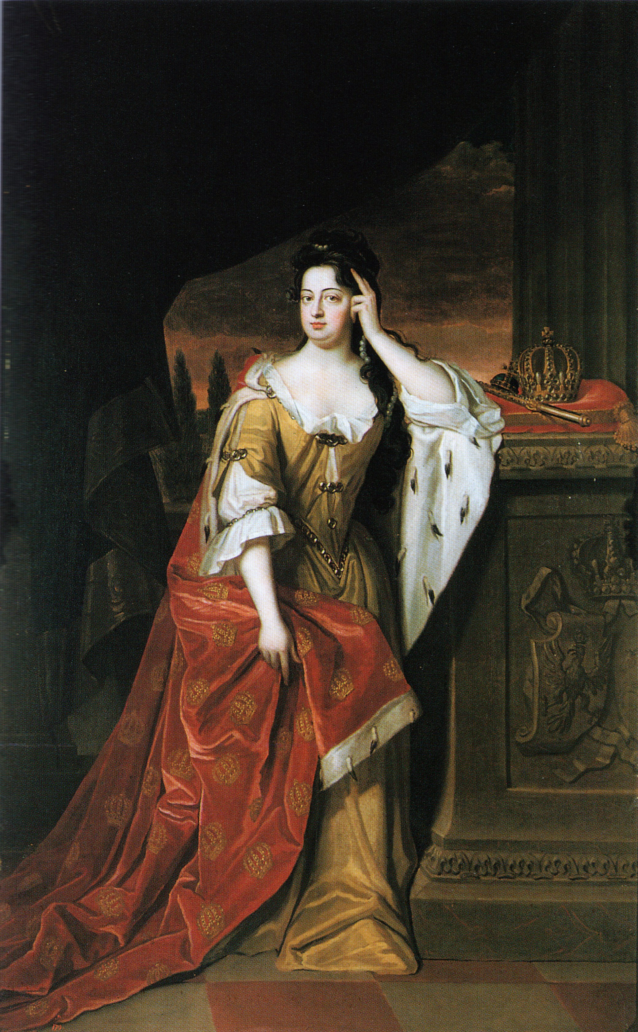 Ölgemälde von Sophie Charlotte von Hannover